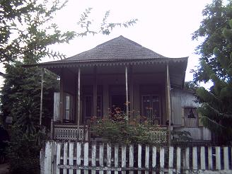 Rumah tradisional Balai Bini.